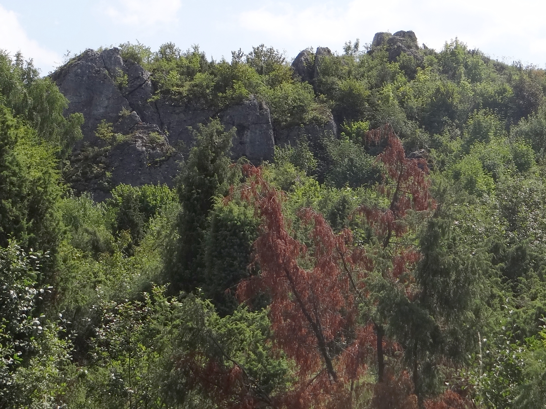 Grupa Łysej w Łutowcu